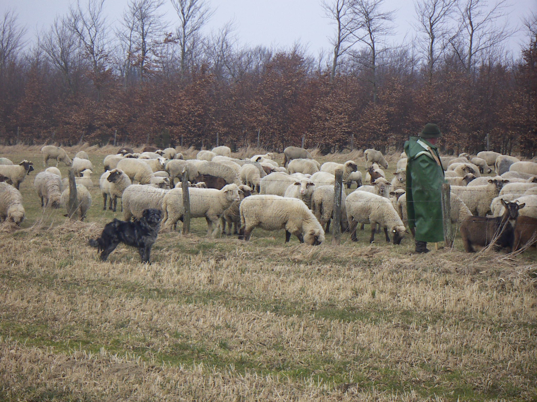 Altdeutscher Hütehund: Tiger in der Eifel